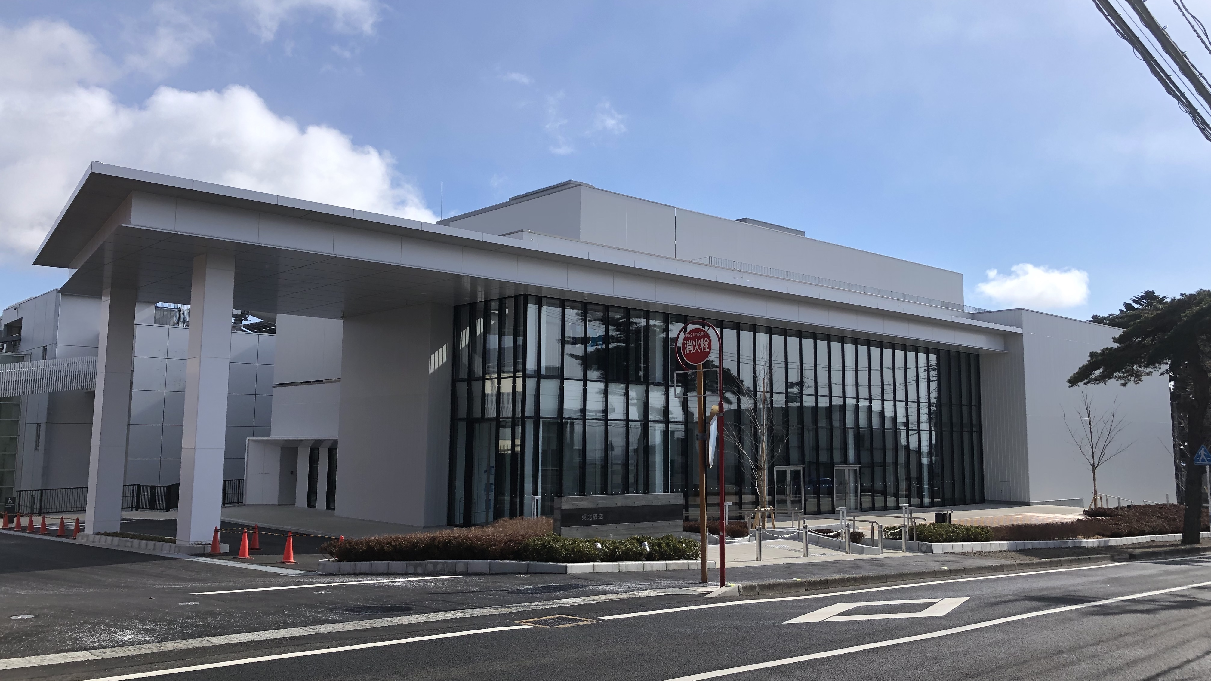 宮城県仙台市太白区に本社を置く東北放送の社屋